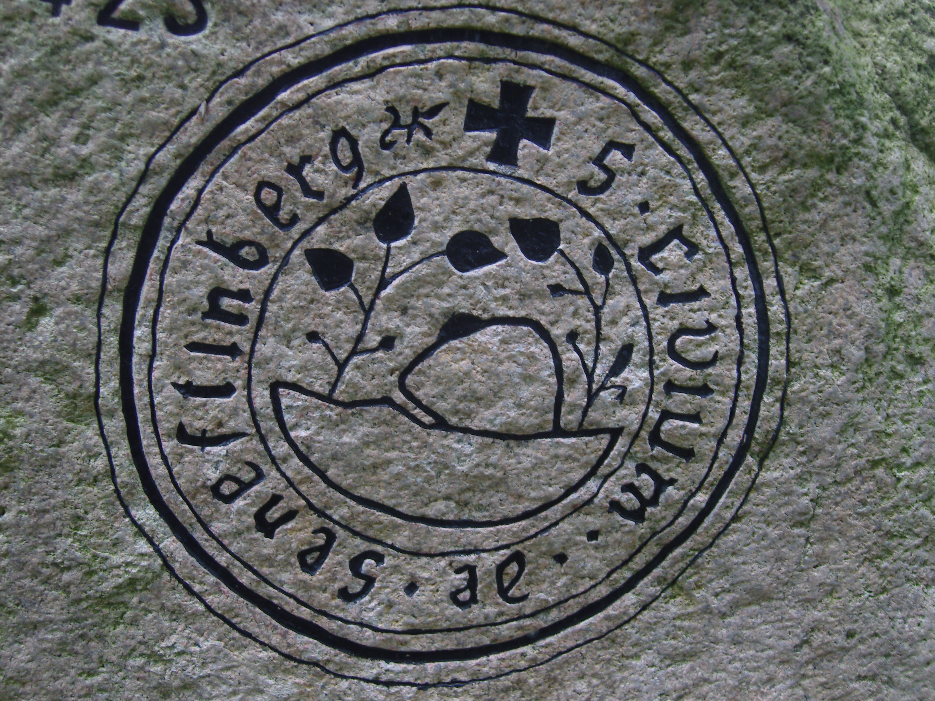 Darstellung des ältesten Senftenberger Siegels auf einem Findling am Ortseingang Senftenberg